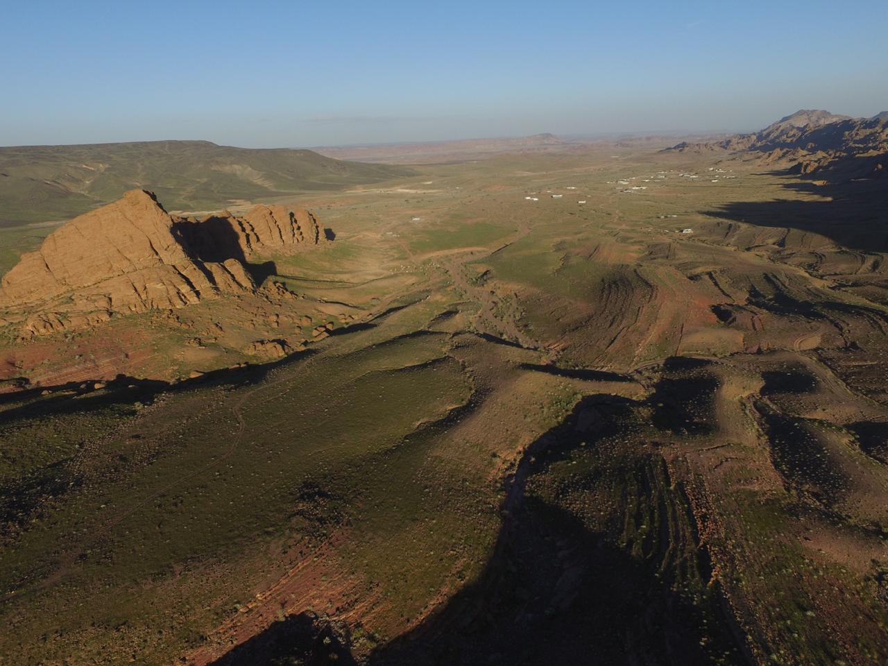 الدارجة: منظر جوي لهجرة أبو طينه..